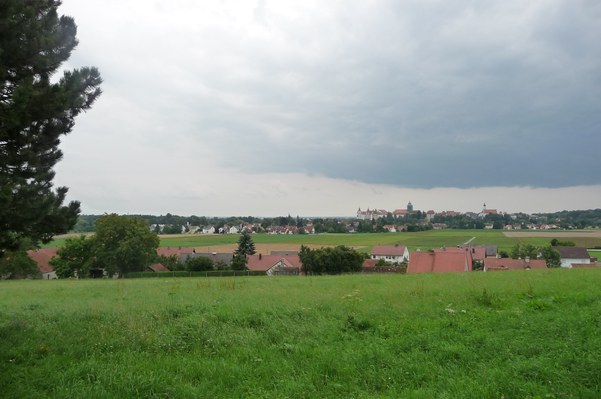 Ein Blick von Hesselohe nach Neuburg-Donau